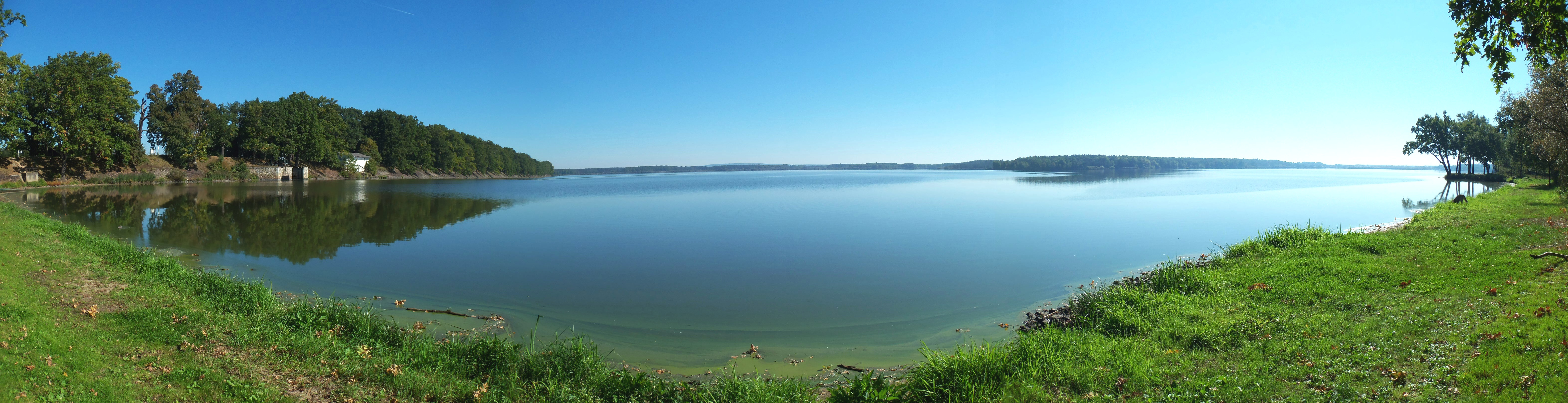 Rybník Rožmberk zabraný z oblasti retenčního prostoru, který je tvořen loukami západním směrem od něho